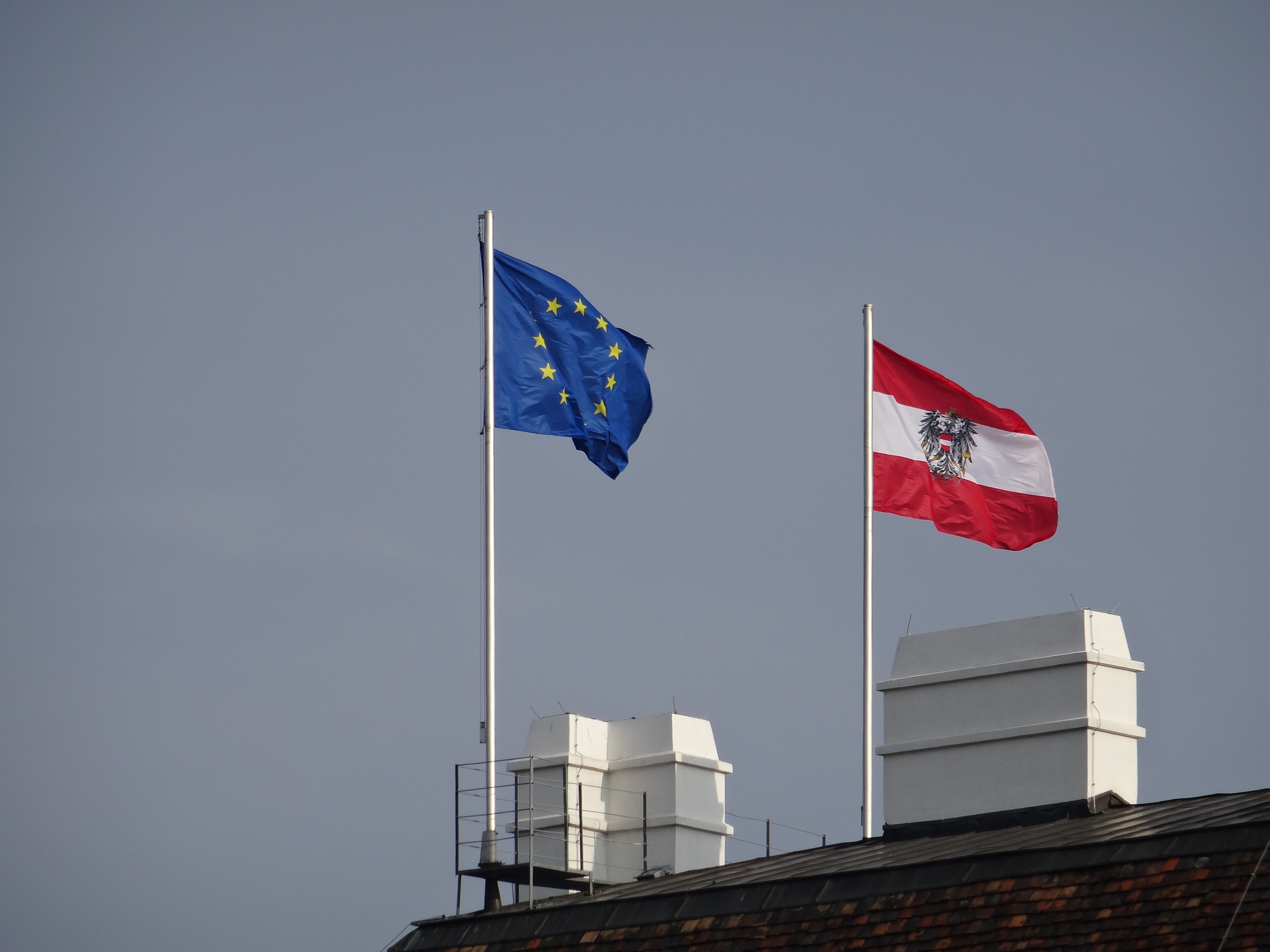 Beflaggung des Leopoldinischen Trakts der Wiener Hofburg, Amtssitz des Bundespräsidenten. Wien, Innere Stadt; Österreich.